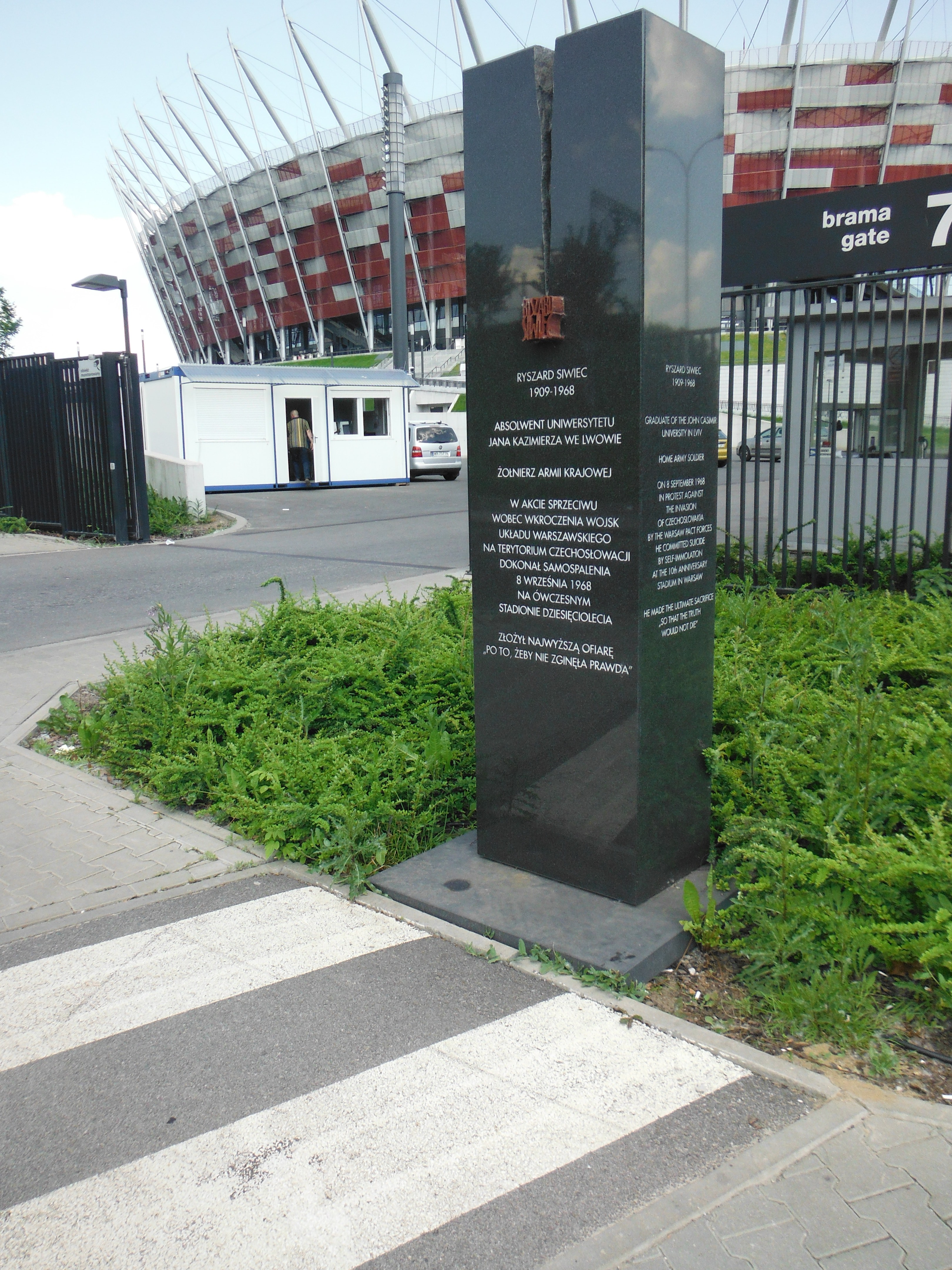 Pomnik Ryszarda Siwca w Warszawie.